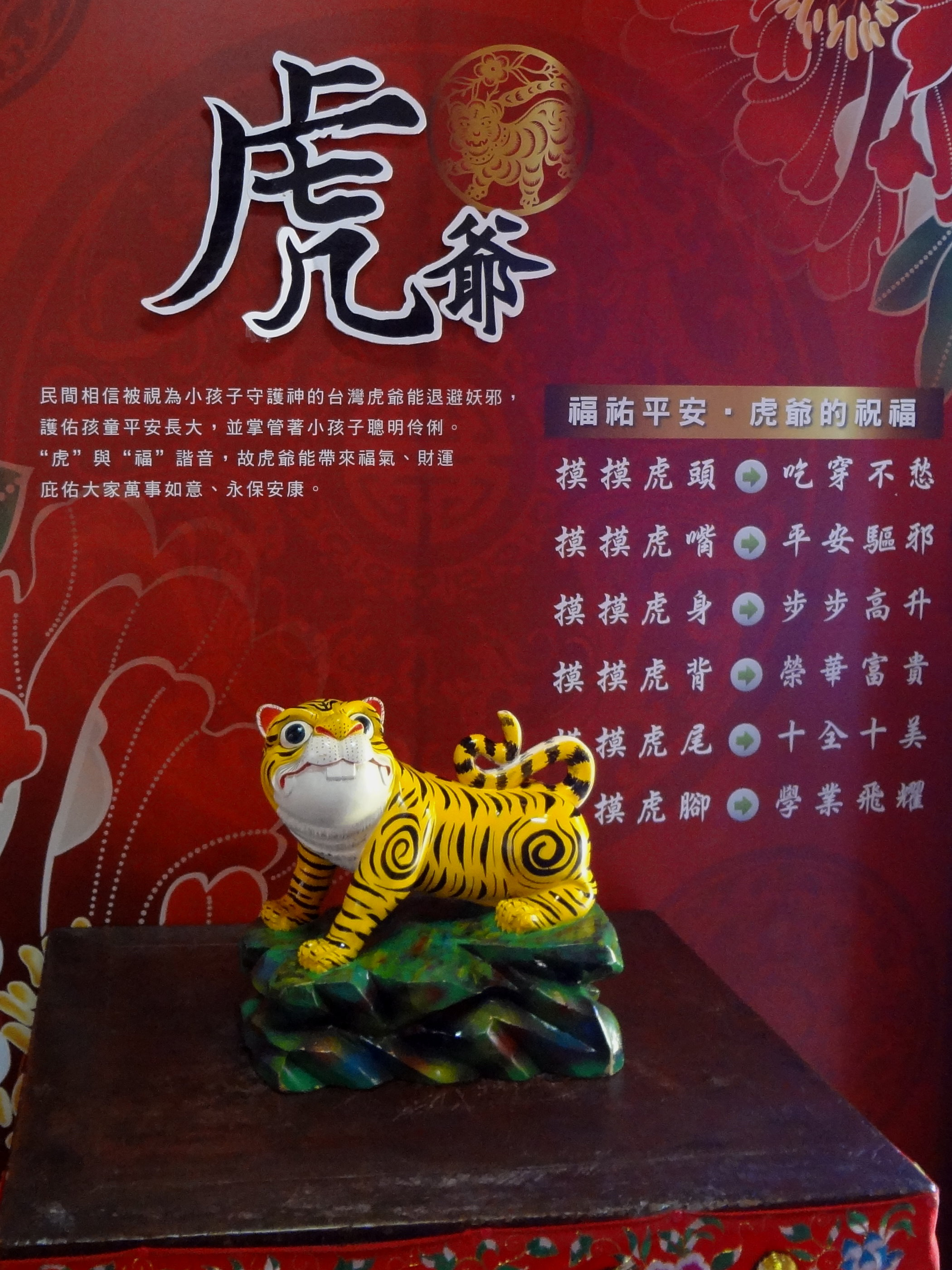 蘆洲李宅虎爺像。